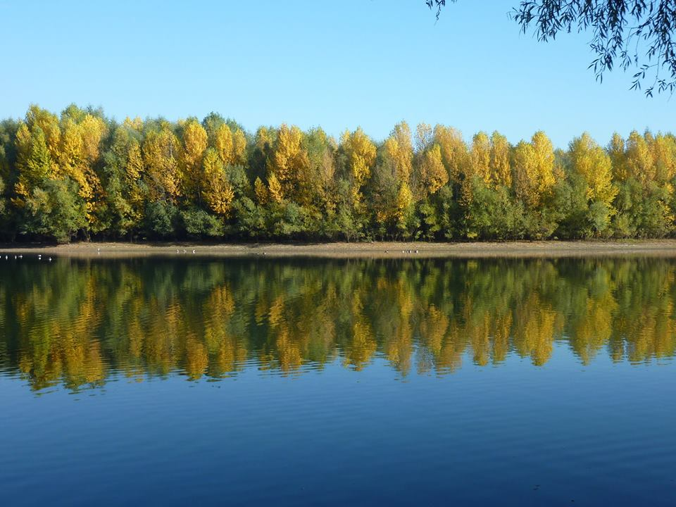 FFH-Gebiet "Die Spey", Meerbusch-Nierst